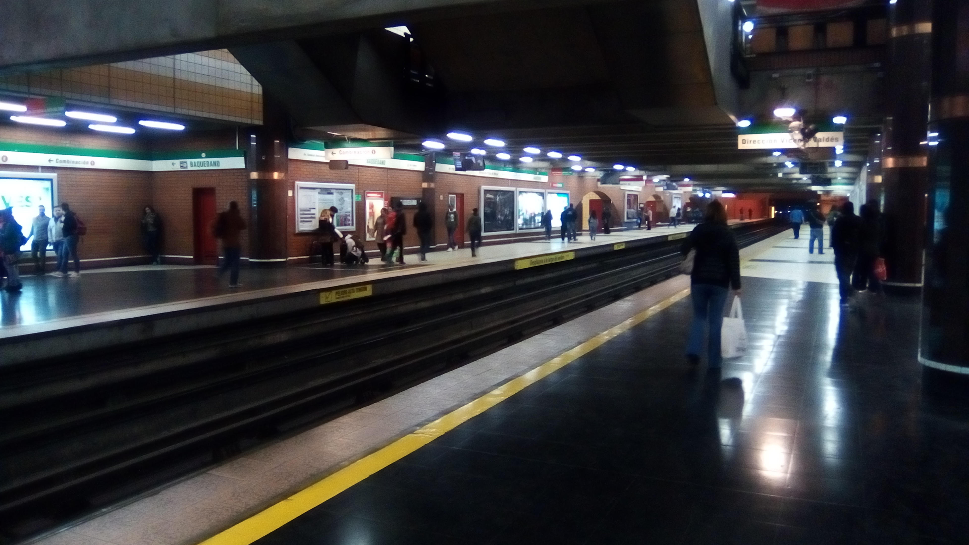 Foto actualizada de la estación, Foto de autoría propia